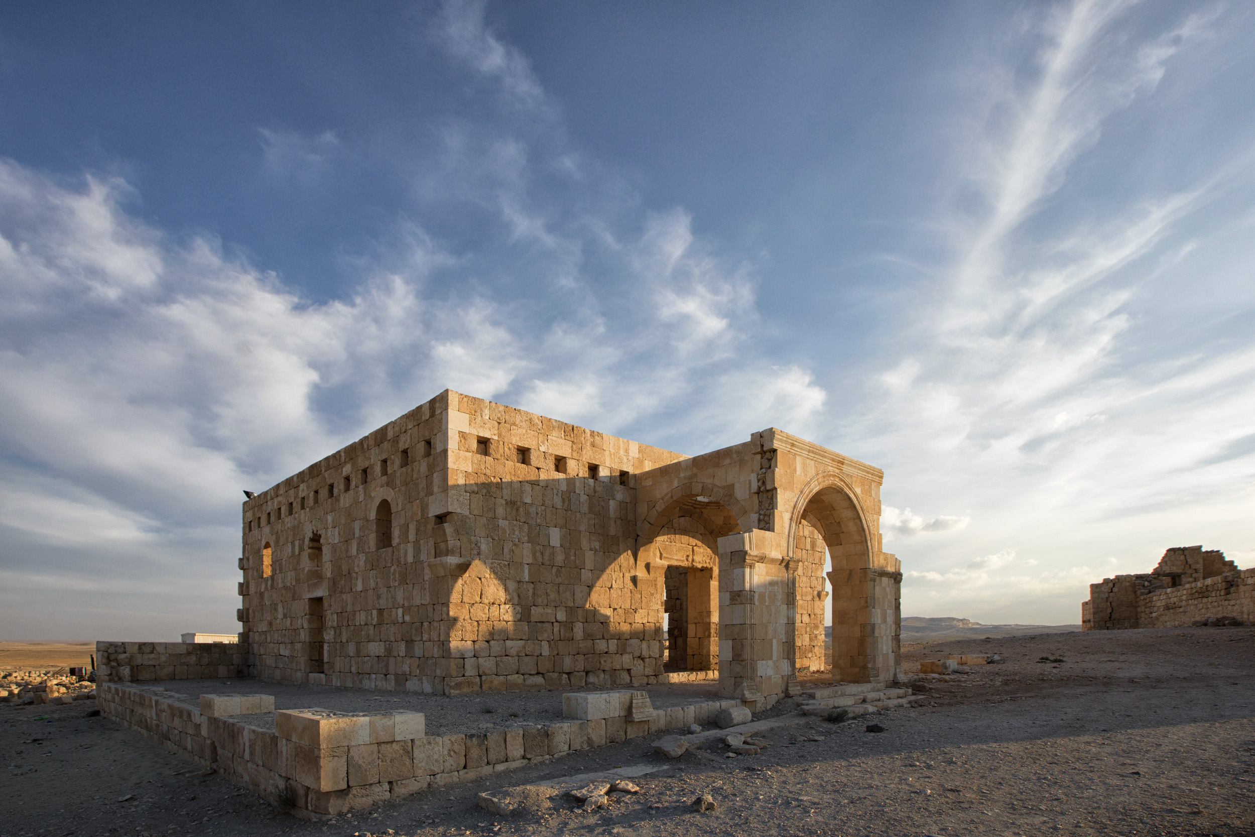 Qasr Al-Hallabat (Mosque)